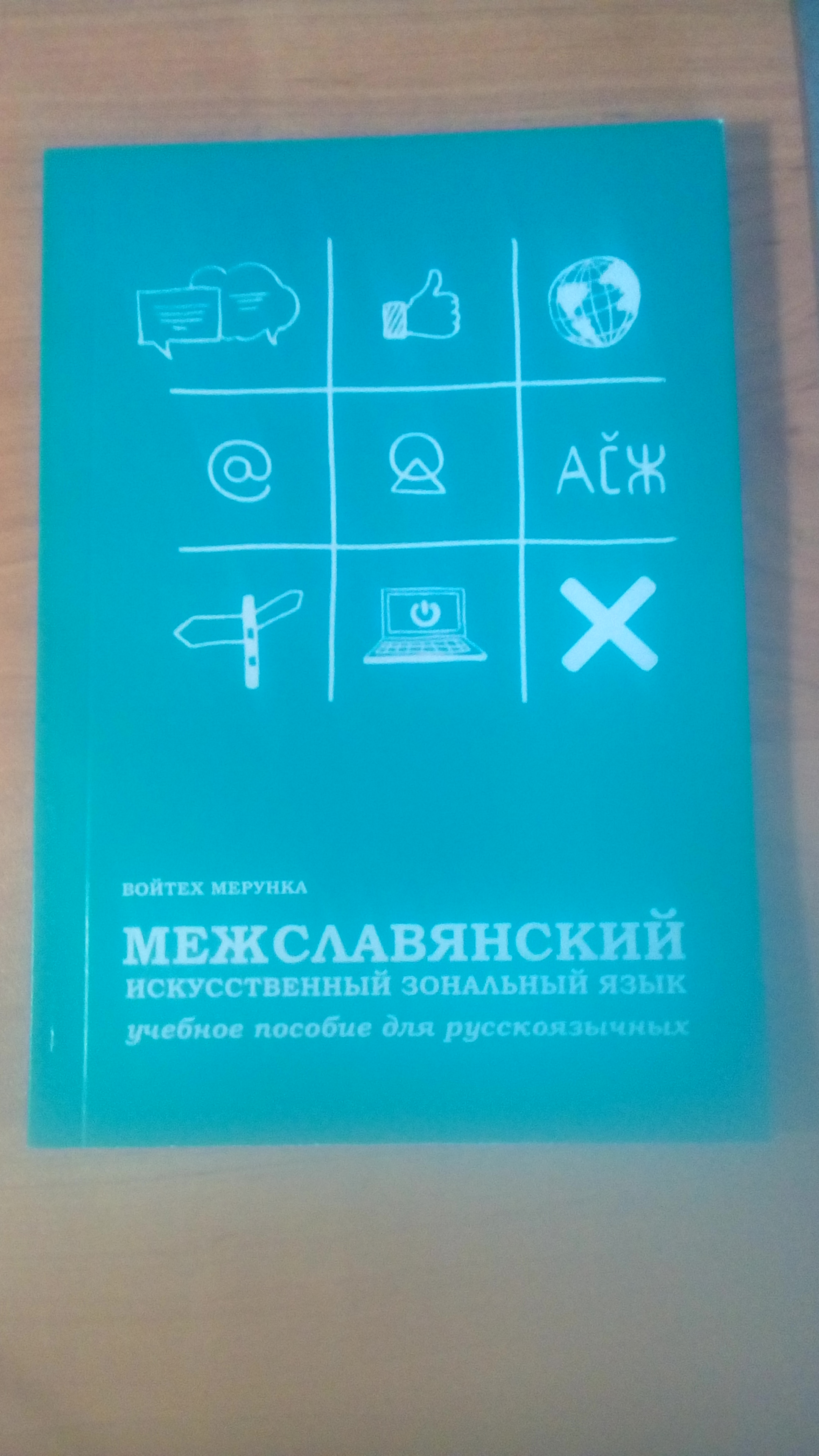 Обложка книги В. Мерунки на русском языке